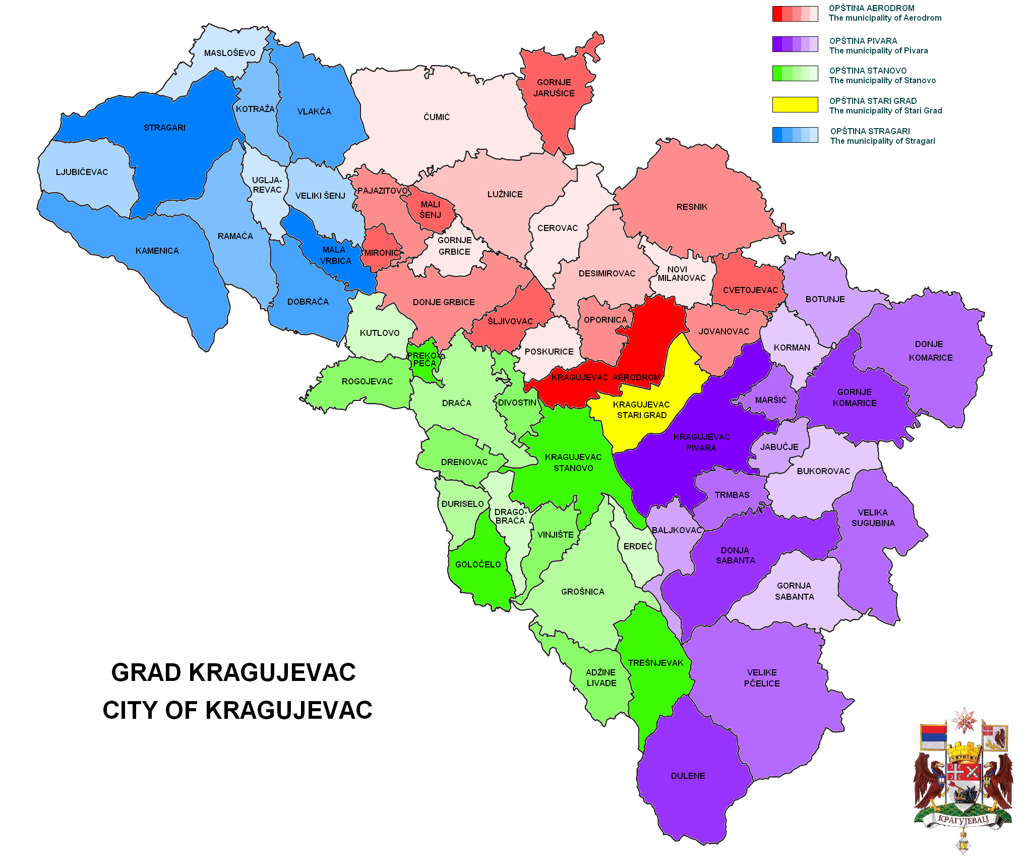 Municipalities and settelments in the City of Kragujevac, Serbia/Municipalités et localités de la Ville de Kragujevac, Serbie